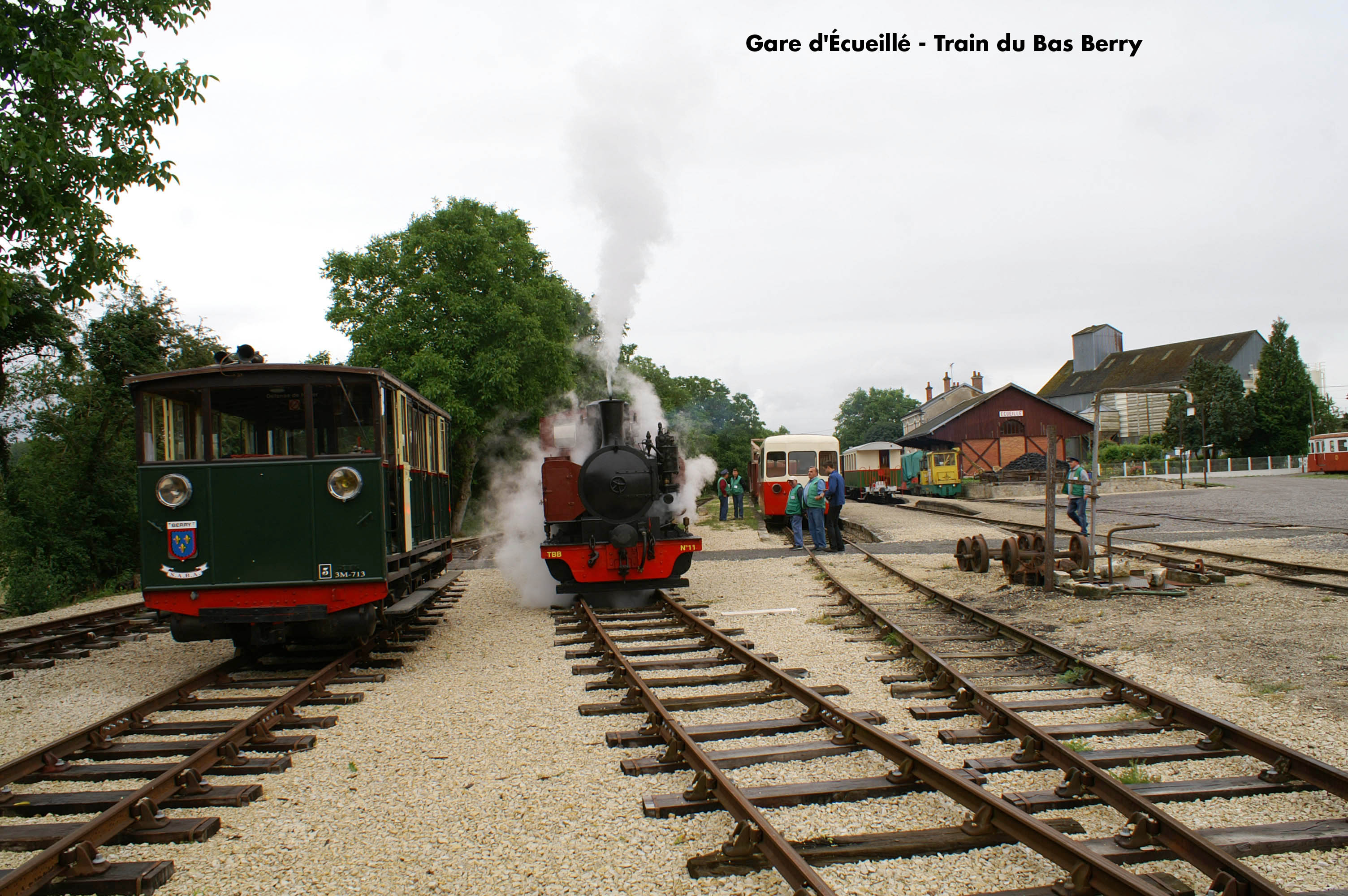 Gare d'Écueillé, matériel roulant du Train du Bas Berry, lors de la journée d'inauguration de la remise en état de la ligne touristique et de la locomotive à vapeur Corpet-Louvet (TBB n°11)